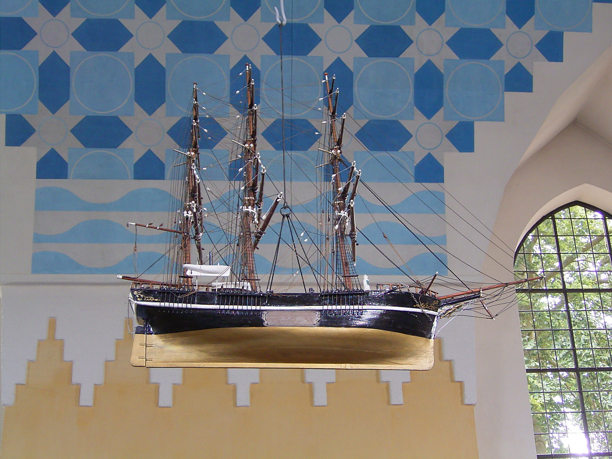 Hobro Kirke